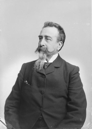 Retrat de bust de l'escriptor i diplomàtic Enrique Gaspar y Rimbau.